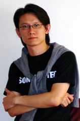 文言: 柯貴民